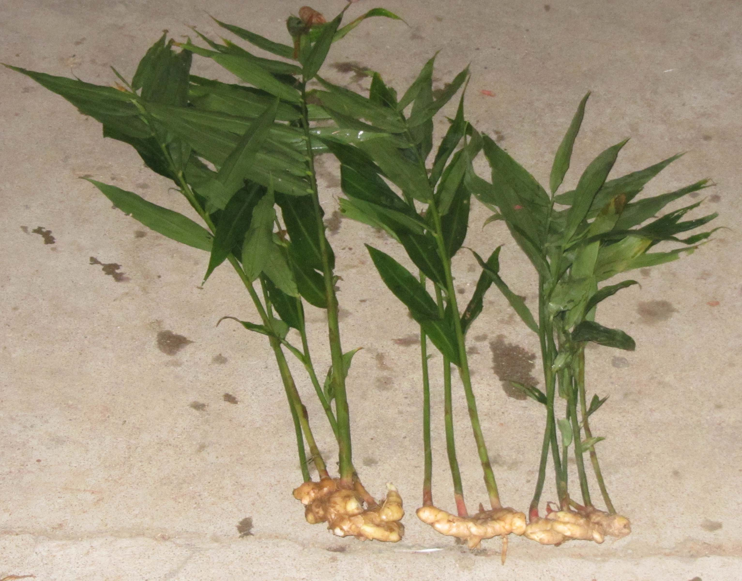 செடியில் இஞ்சி. பொங்கல்விழாவில் படையல் செய்வர். விற்பனைக்காக.